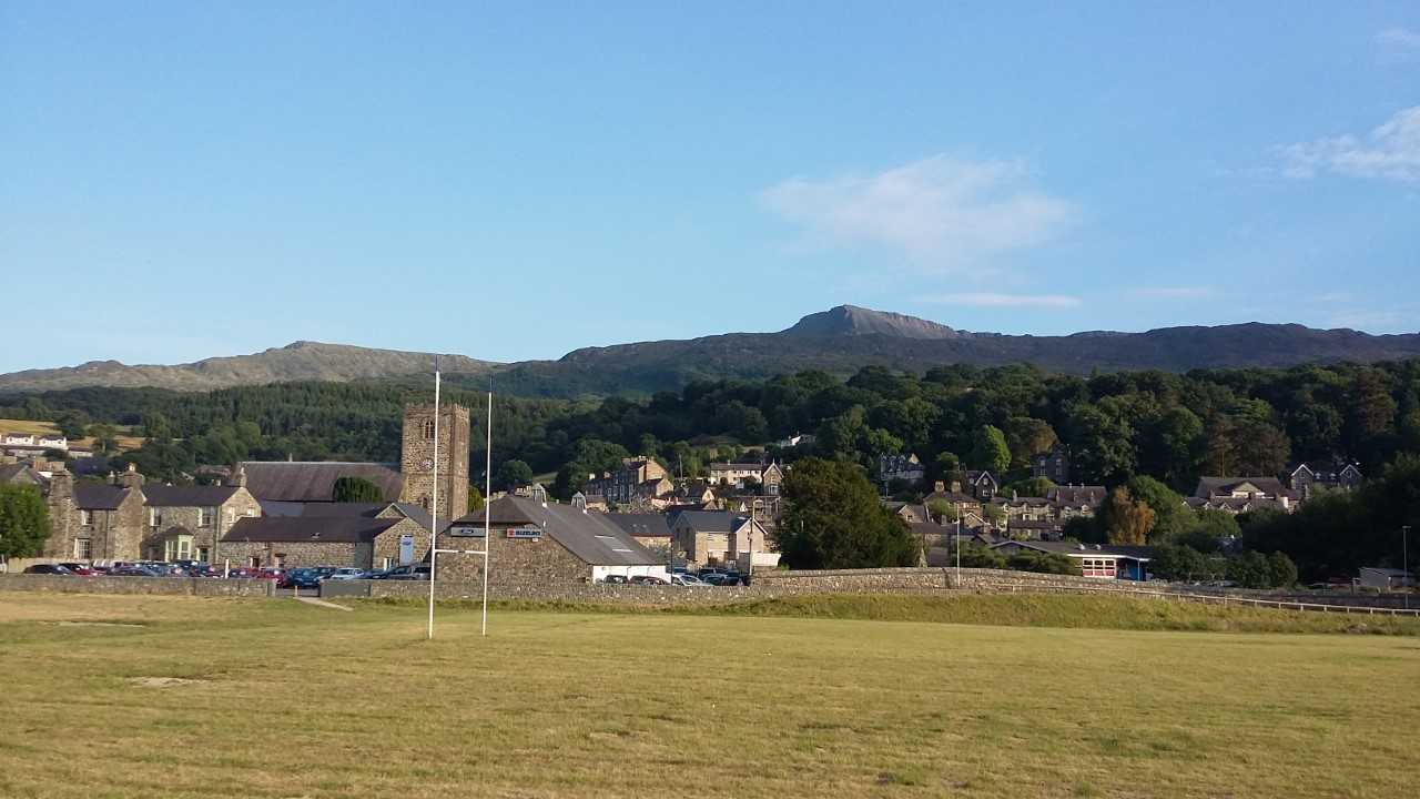 Dolgellau, Gogledd Cymru